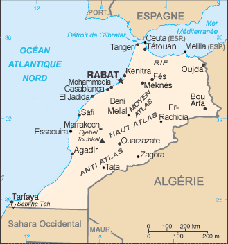 Carte du Maroc